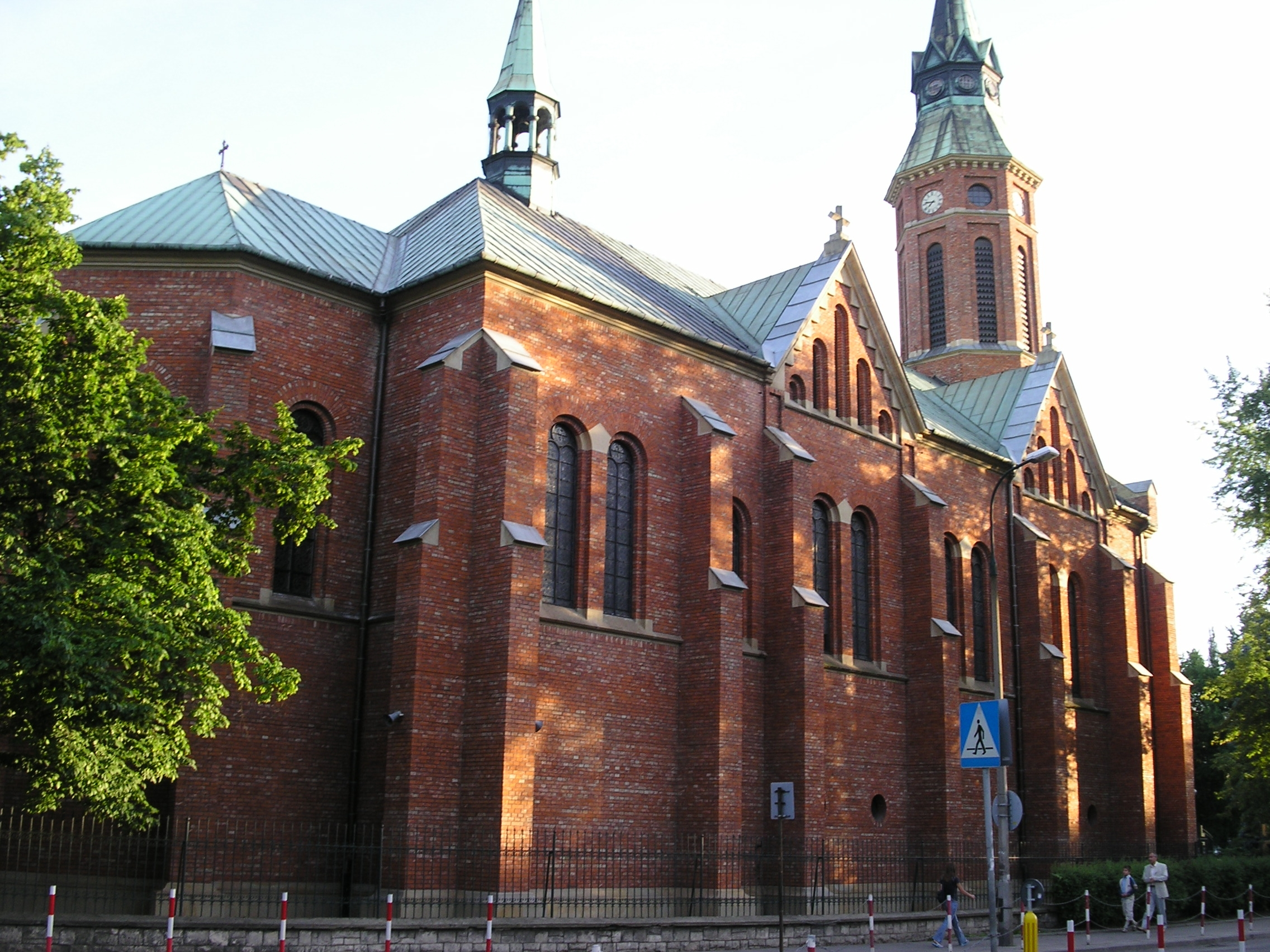 en: Church of Blessed Virgin Maria from Lourdes, Cracow de: Kirche der Heiligen Maria von Lourdes, Krakau it: Chiesa di Santa Maria Virgine di Lourdes, Cracovia pl: Kościół p.w. Najświętszej Marii Panny z Lourdes, Kraków